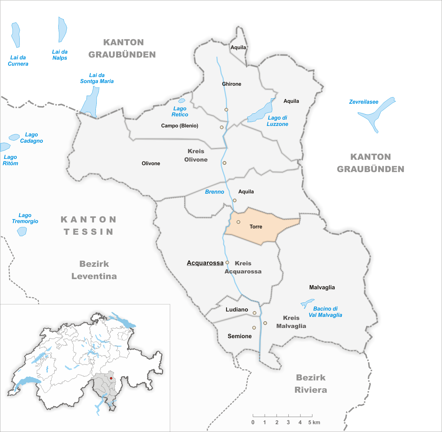 Municipality Torre